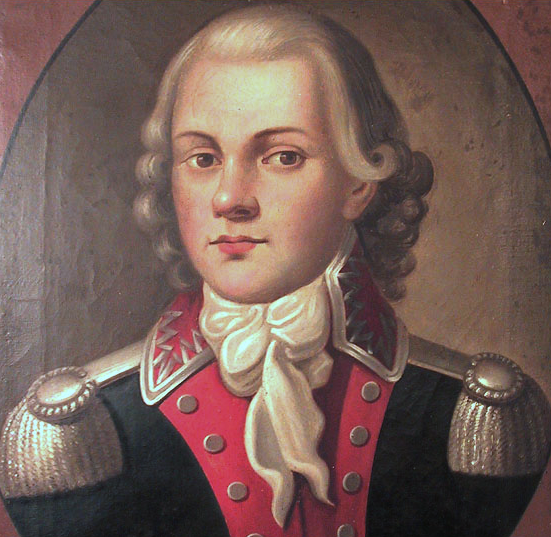 Jakub Jasiński